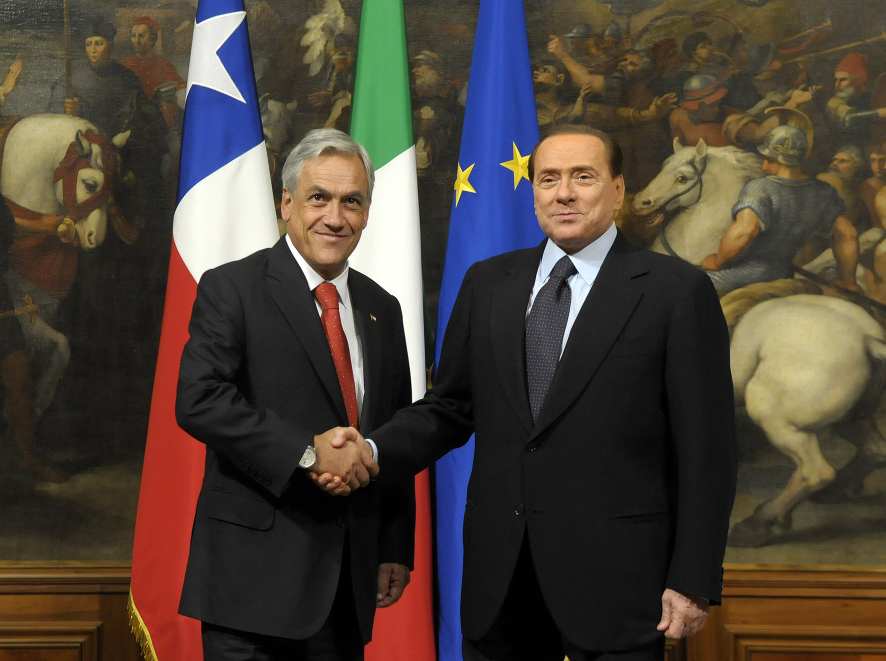 Gira a Europa y Medio Oriente. Reunión de Sebastián Piñera y Silvio Berlusconi